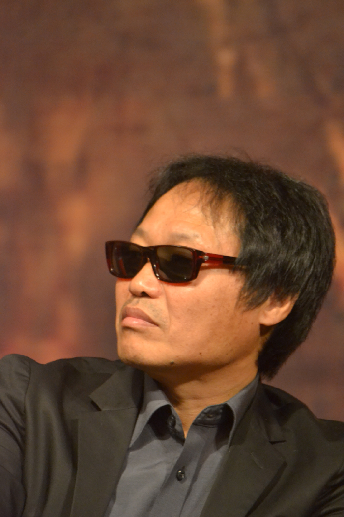 영화감독 곽재용